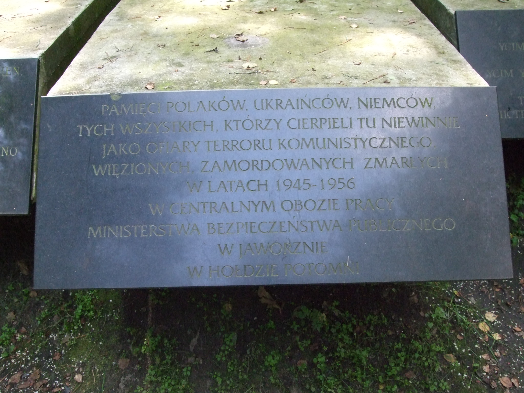 Pomnik więźniów obozu w Jaworznie. Inskrypcja na pomniku w trzech językach; polskim, ukraińskim i niemieckim: "Pamięci Polaków, Ukraińców, Niemców, tych wszystkich, którzy cierpieli tu niewinnie, jako ofiary terroru komunistycznego, więzionych, zamordowanych, zmarłych w latach 1945-1956 w Centralnym Obozie Pracy w Jaworznie w hołdzie potomni"